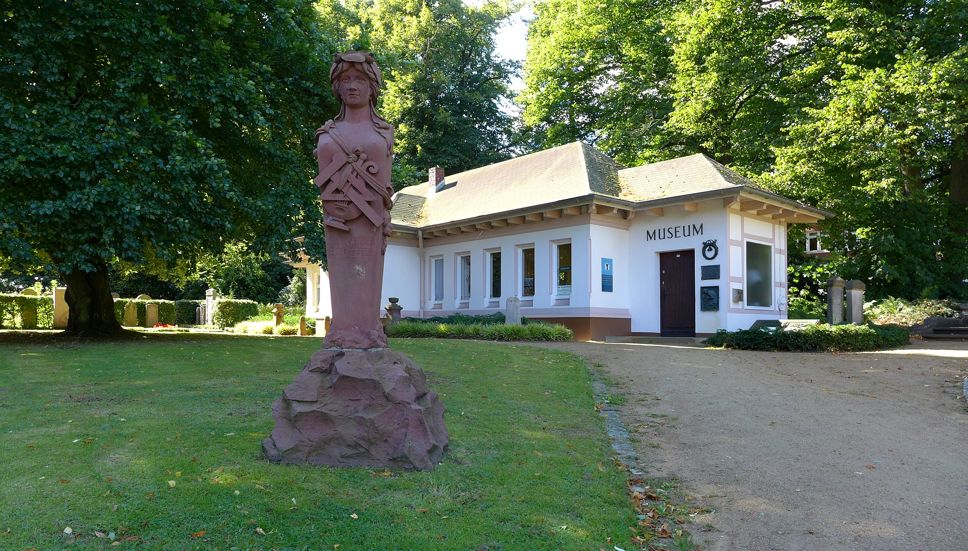 Museum auf dem Friedhof Ohlsdorf in Hamburg. Aufnahmedatum 2015-09.Im Vordergrund das Grabmal (roter Sandstein, 1890) des deutschen Bildhauers Engelbert Peiffer, seit 2004 am jetzigen Standort, für den finnisch-deutschen Architekten Alexander Schaeffer (Schäffer).Einzelheiten bei Barbara Leisner, Heiko K. L. Schulze, Ellen Thormann: Der Hamburger Hauptfriedhof Ohlsdorf. Geschichte und Grabmäler. 2 Bände und eine Übersichtskarte 1:4000. Hans Christians, Hamburg 1990, ISBN 3-7672-1060-6, Seite 40, Kat. 200 (inkl. historischem Foto am ursprünglichen Standort T 14).